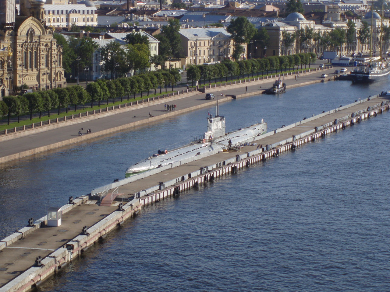 Река Нева